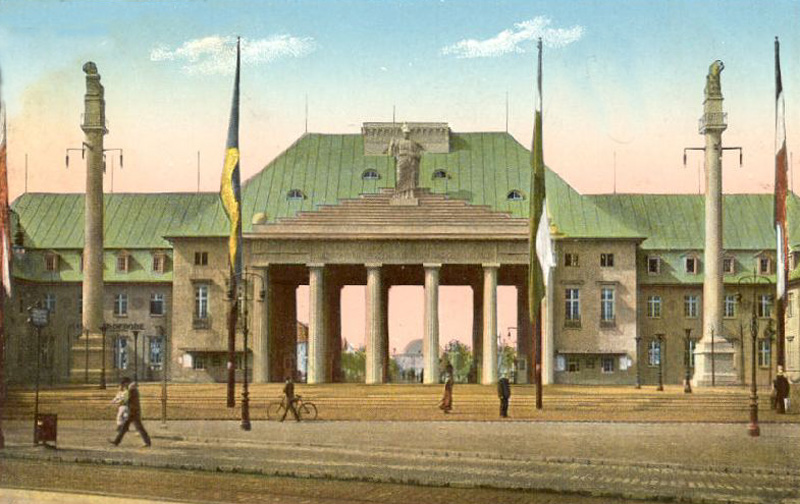 Internationale Baufach-Ausstellung 1913 in Leipzig, Haupteingang an der Reitzenhainer Straße